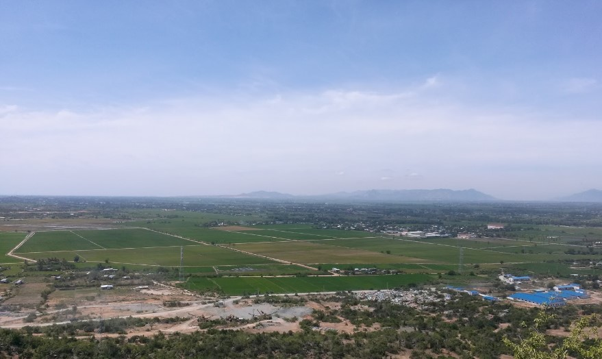 Toàn cảnh Nha Hố